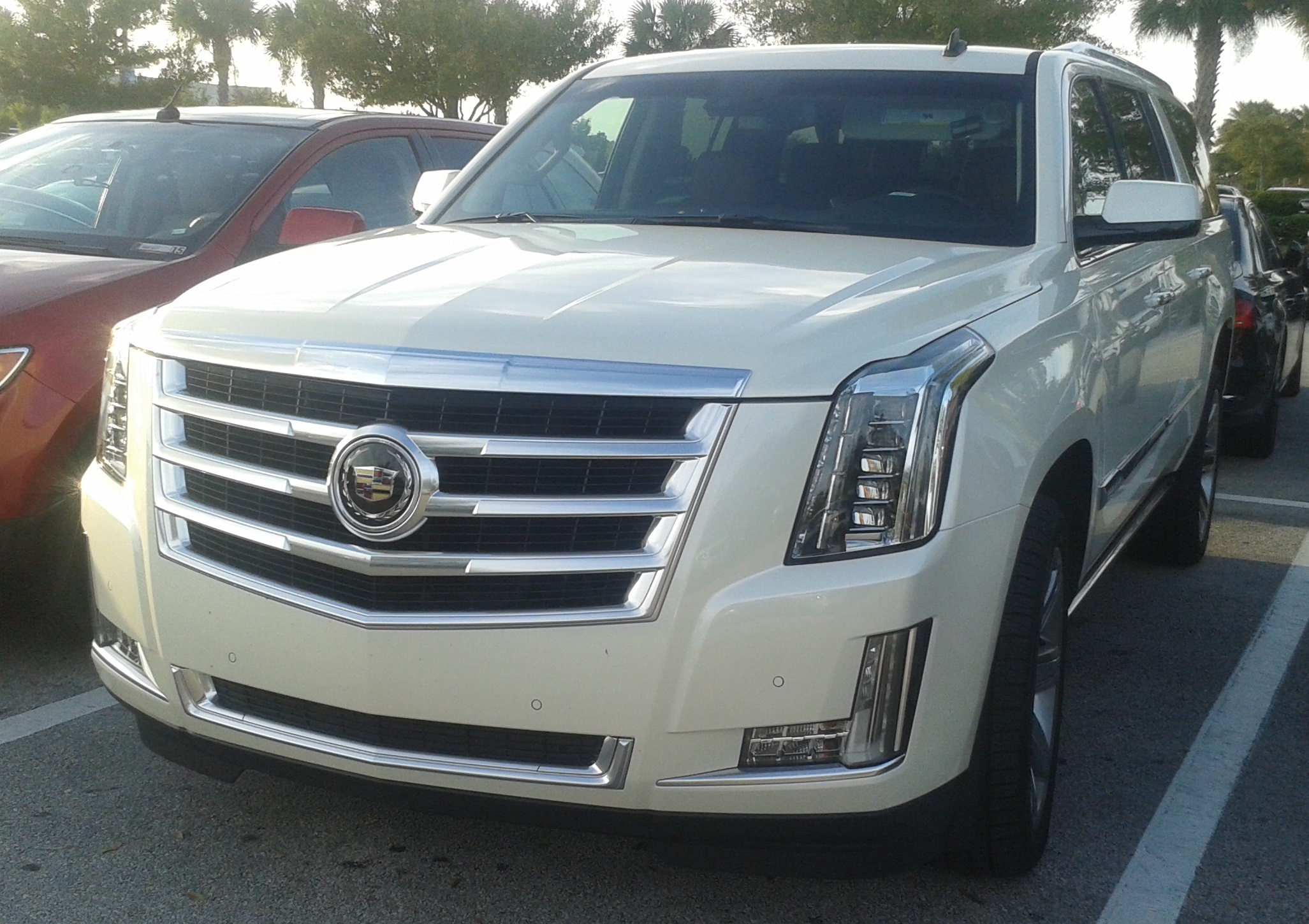 2015 Cadillac Escalade ESV photographed in Orlando, Florida, USA.